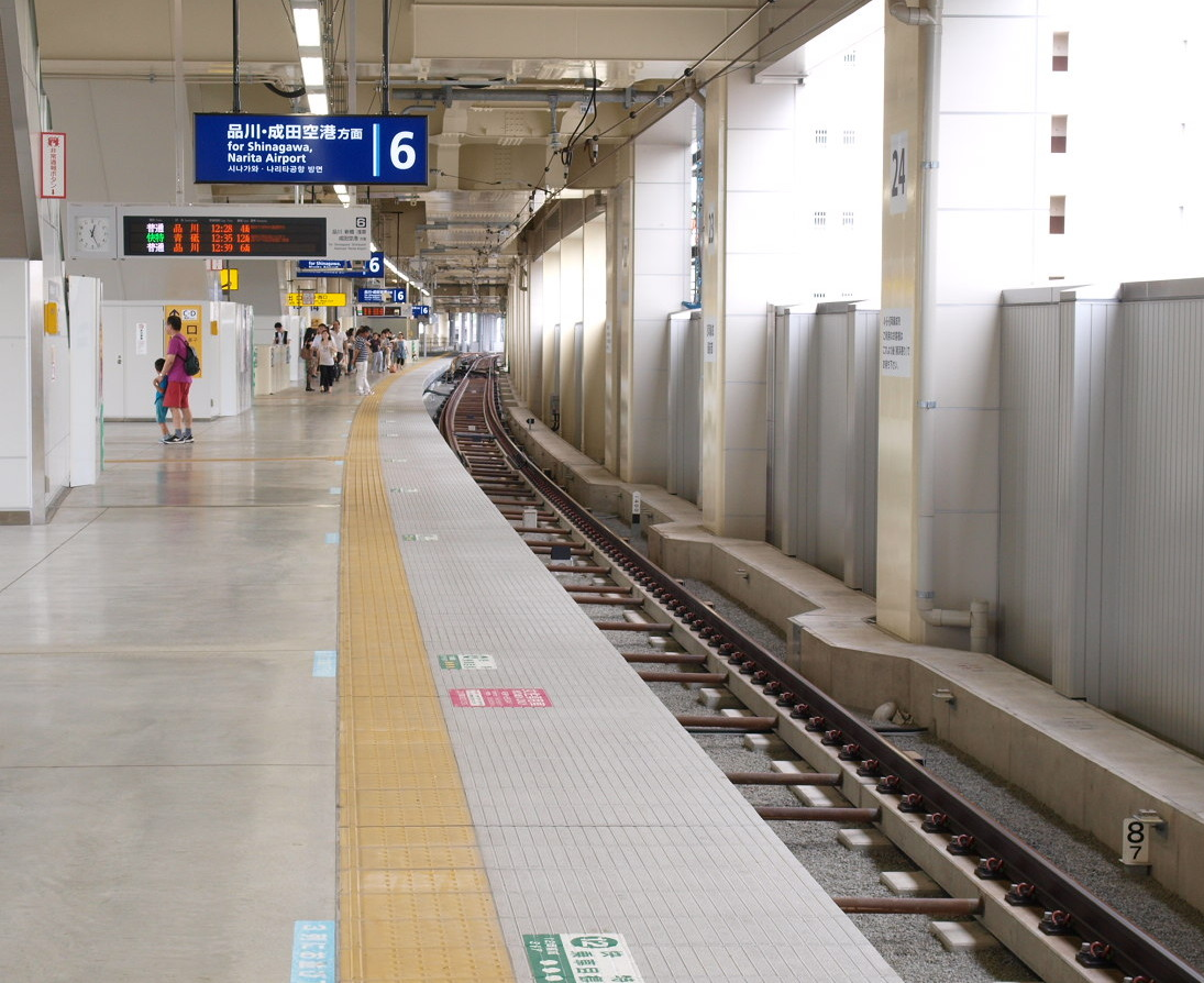 京急蒲田駅6番線ホーム